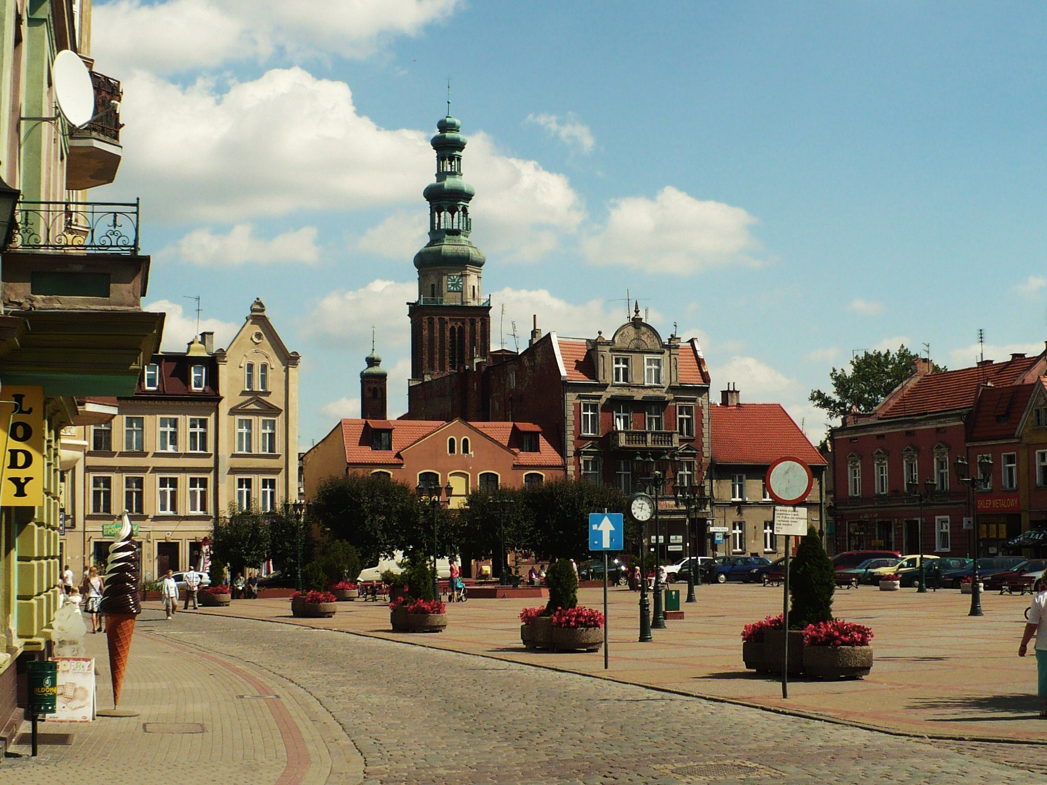 Widok z Rynku na konkatedrę chełmżyńską